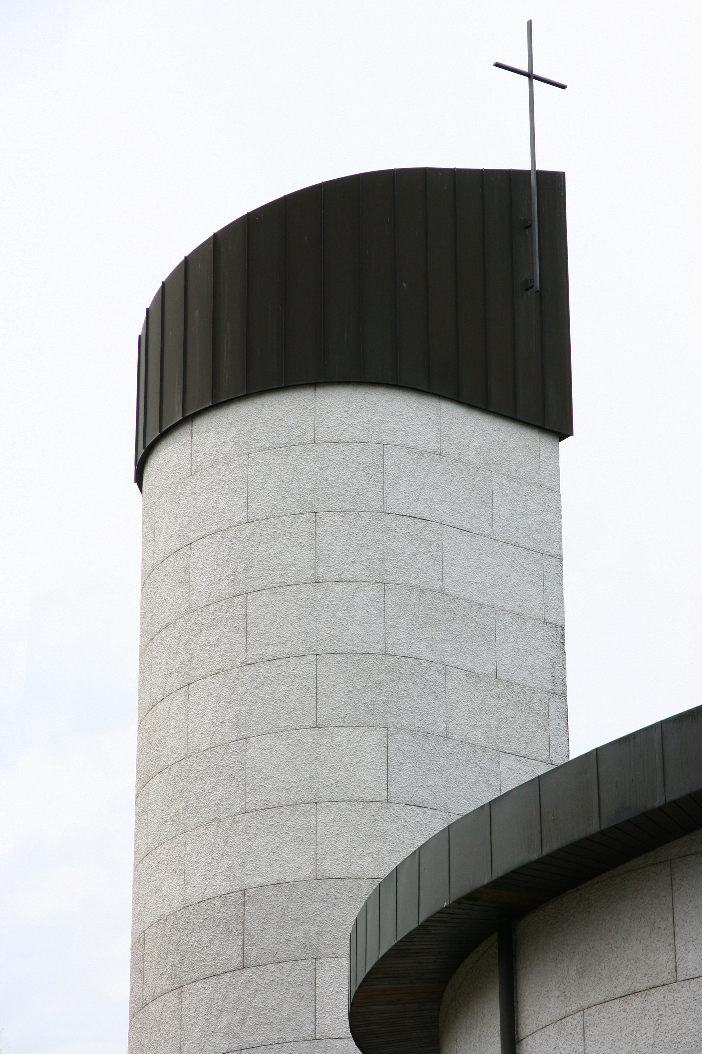 Römisch-katholische Kirche St. Jakobus Hütten ZH